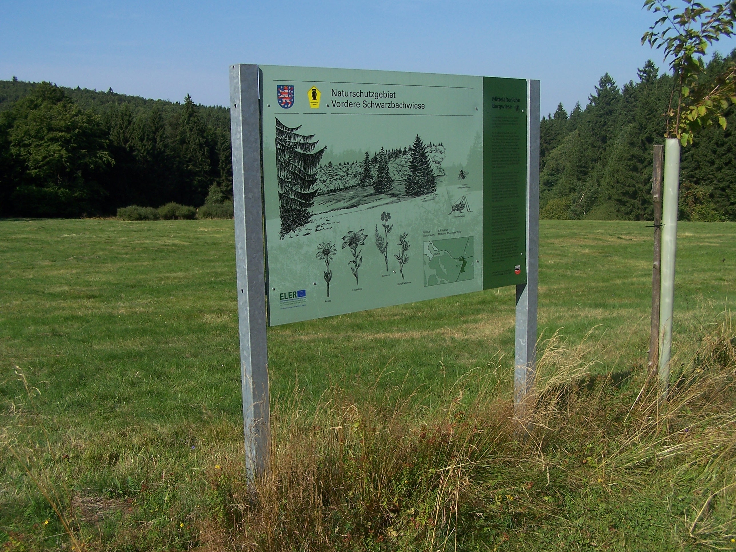 Hinweistafel zum Naturschutzgebiet Vordere Schwarzbachswiese bei Ruhla und Waltershausen-Winterstein.